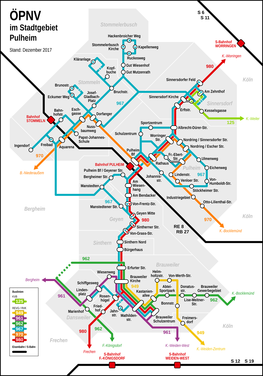 Bus- und Bahnlinien in Pulheim